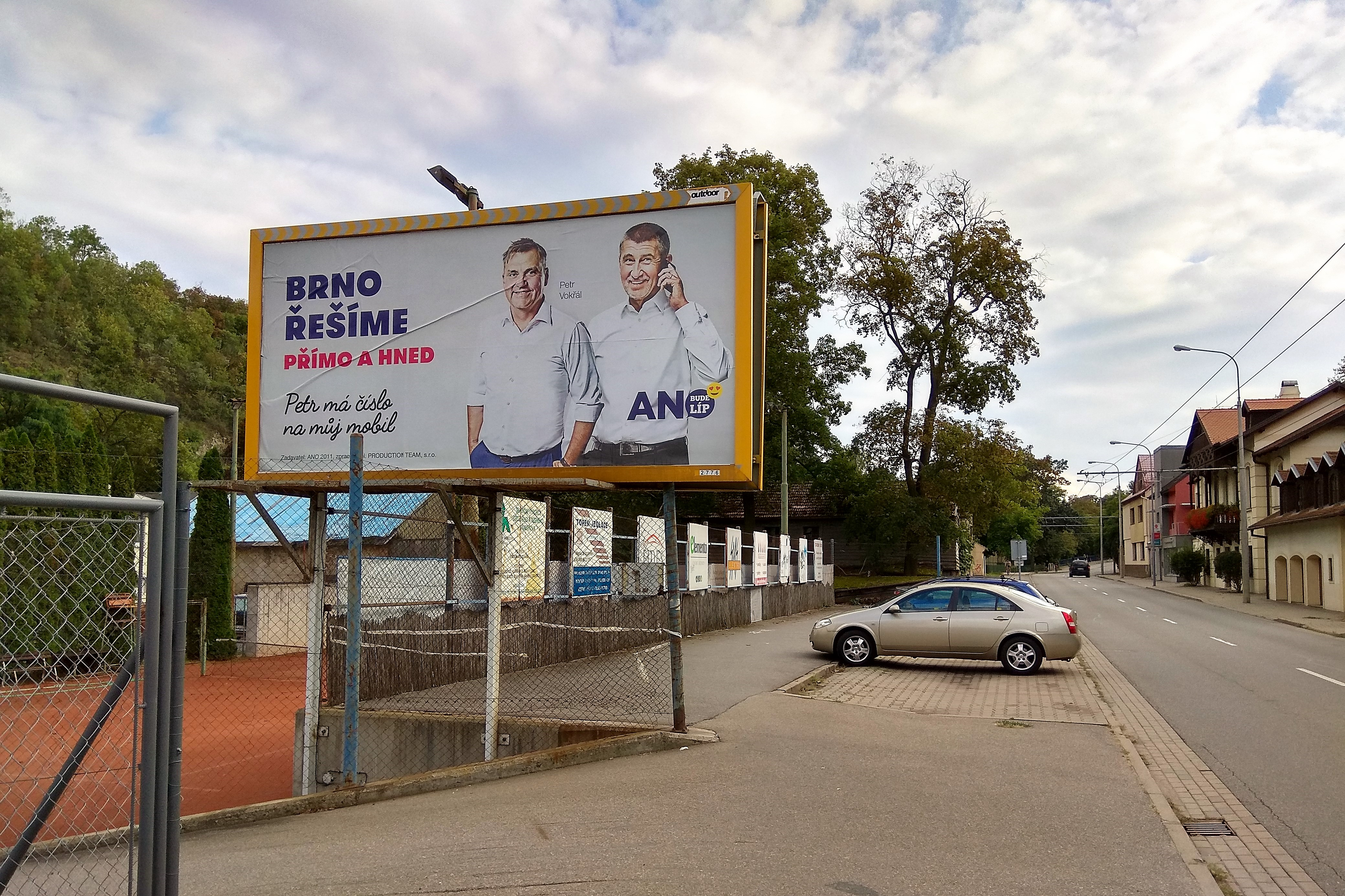 Billboard z kampaně před komunálními volbami v říjnu 2018 ve Veslařské ulici v Brně-Jundrově. Vlevo tenisové kurty, průhled ulicí směrem k jihu.